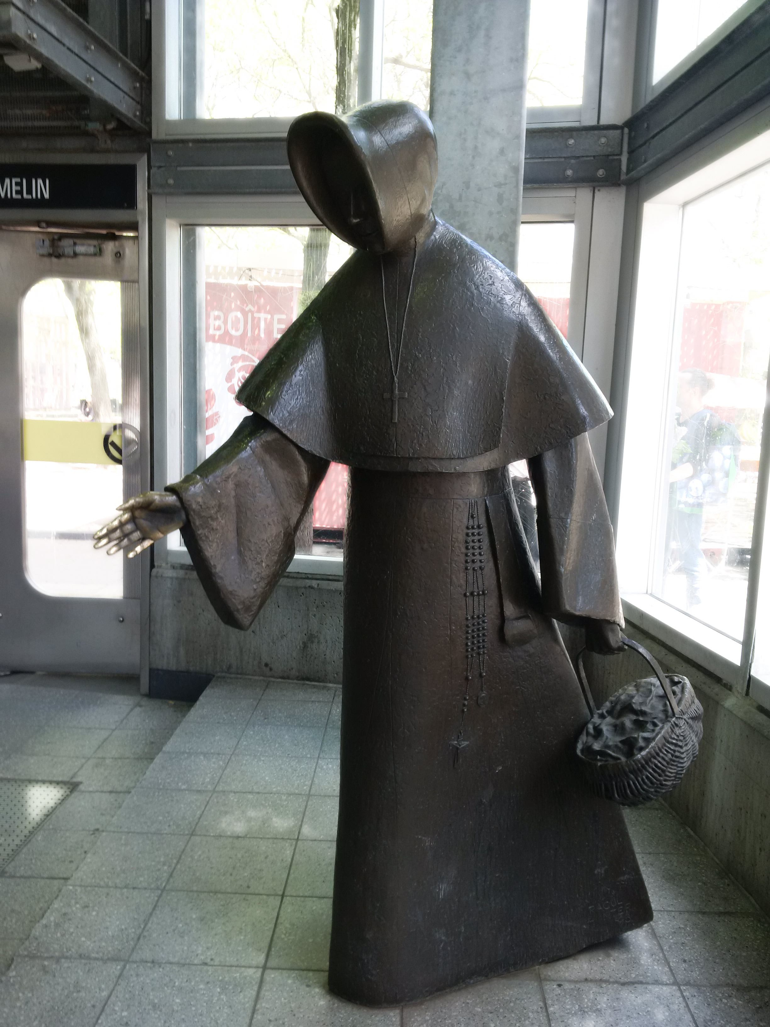 La statue de mère Émilie Gamelin loge dans l’édicule de la station de métro Berri-UQAM. L’artiste Raoul Hunter s’est inspiré du portrait peint de mère Gamelin, conservé à la maison-mère de la communauté des sœurs de la Providence.